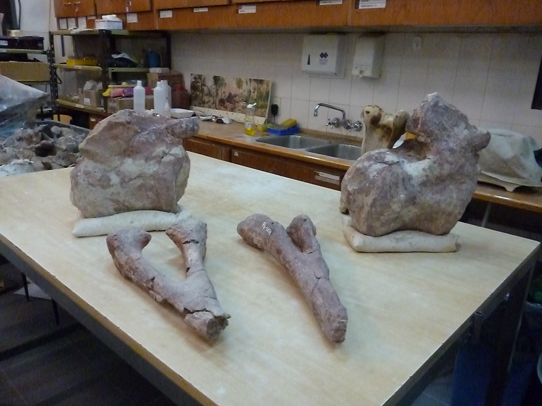 Fósiles del titanosauria del Chubut en el Museo Egidio Feruglio de Trelew, Chubut, Argentina. Descubiertos en 2013 y presentados en 2014, supuestamente se trata del animal terrestre más grande de la historia de la Tierra. Pesaría 4 toneladas más que el Argentinosaurus y su fémur mide más de dos metros.